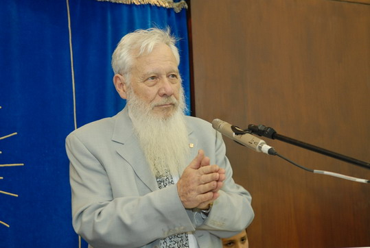 ישיבת מרכז הרב.